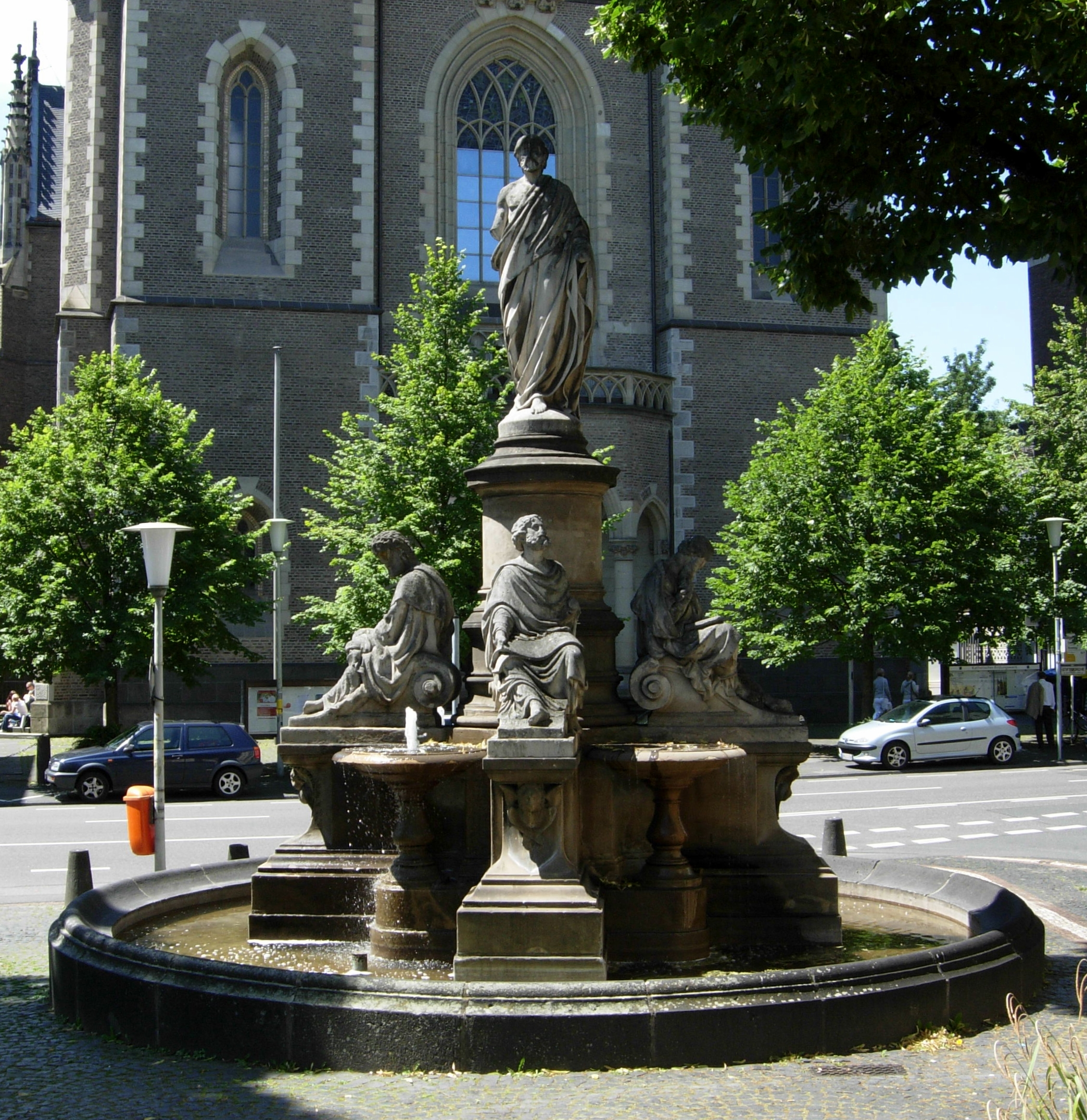 Christusbrunnen (1878) von Bernhard Afinger auf dem Stiftsplatz in Bonn (an der Kölnstraße vor der Stiftskirche); der Brunnen stand ursprünglich auf dem Alten Friedhof Bonn